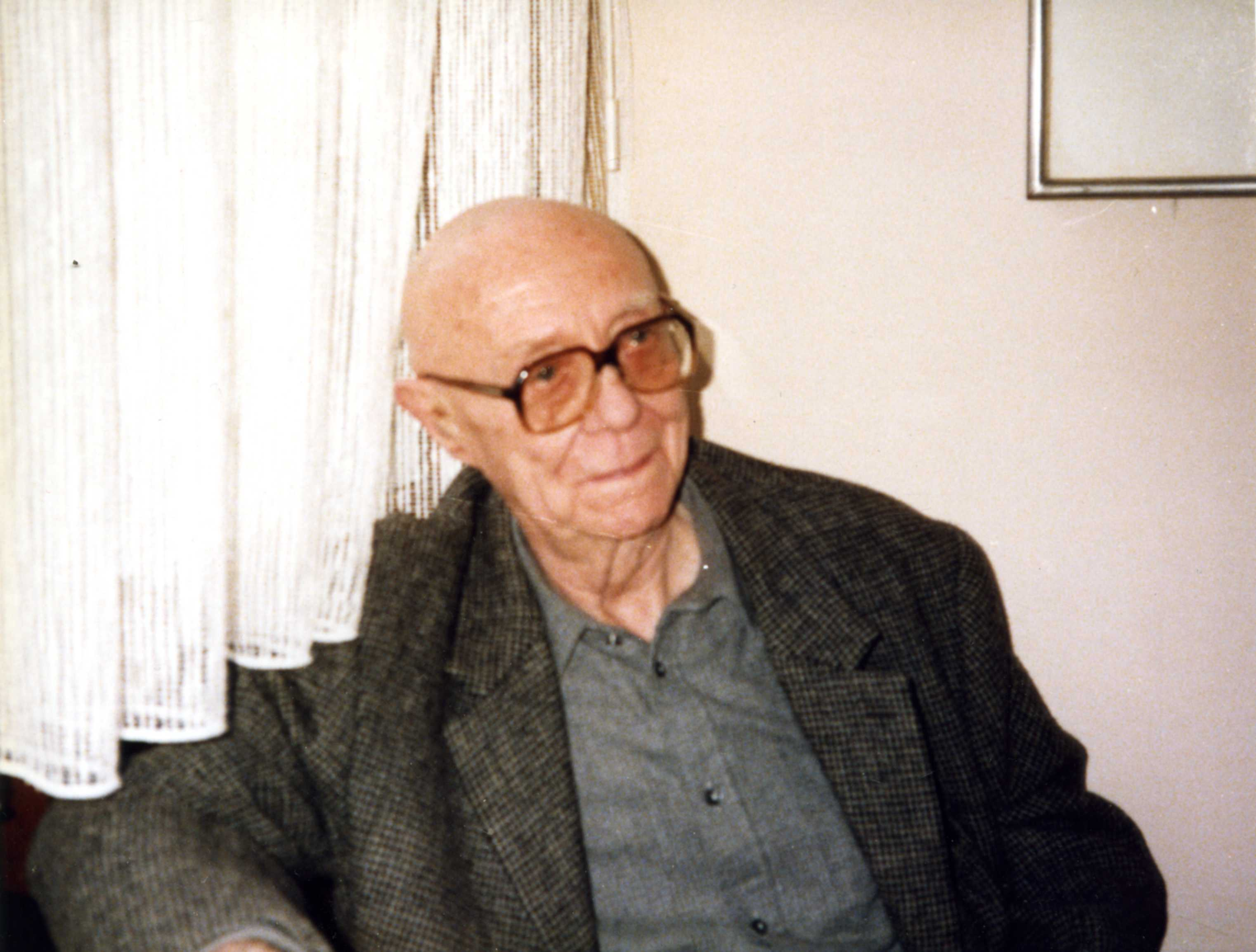 L'écrivain belge Louis Scutenaire dans sa maison de la rue de la Luzerne à Bruxelles